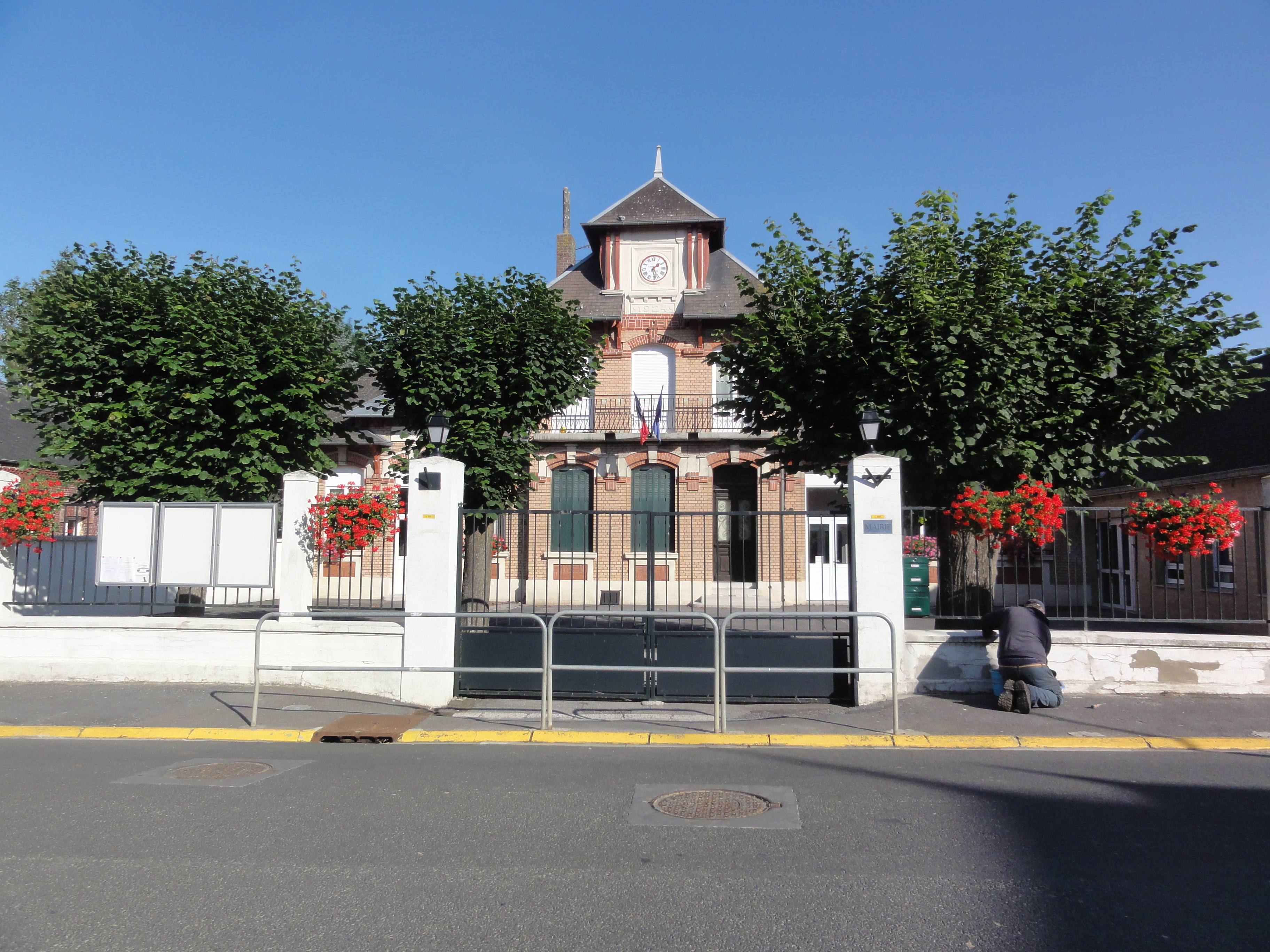 Mesnil-Saint-Laurent (Aisne) mairie